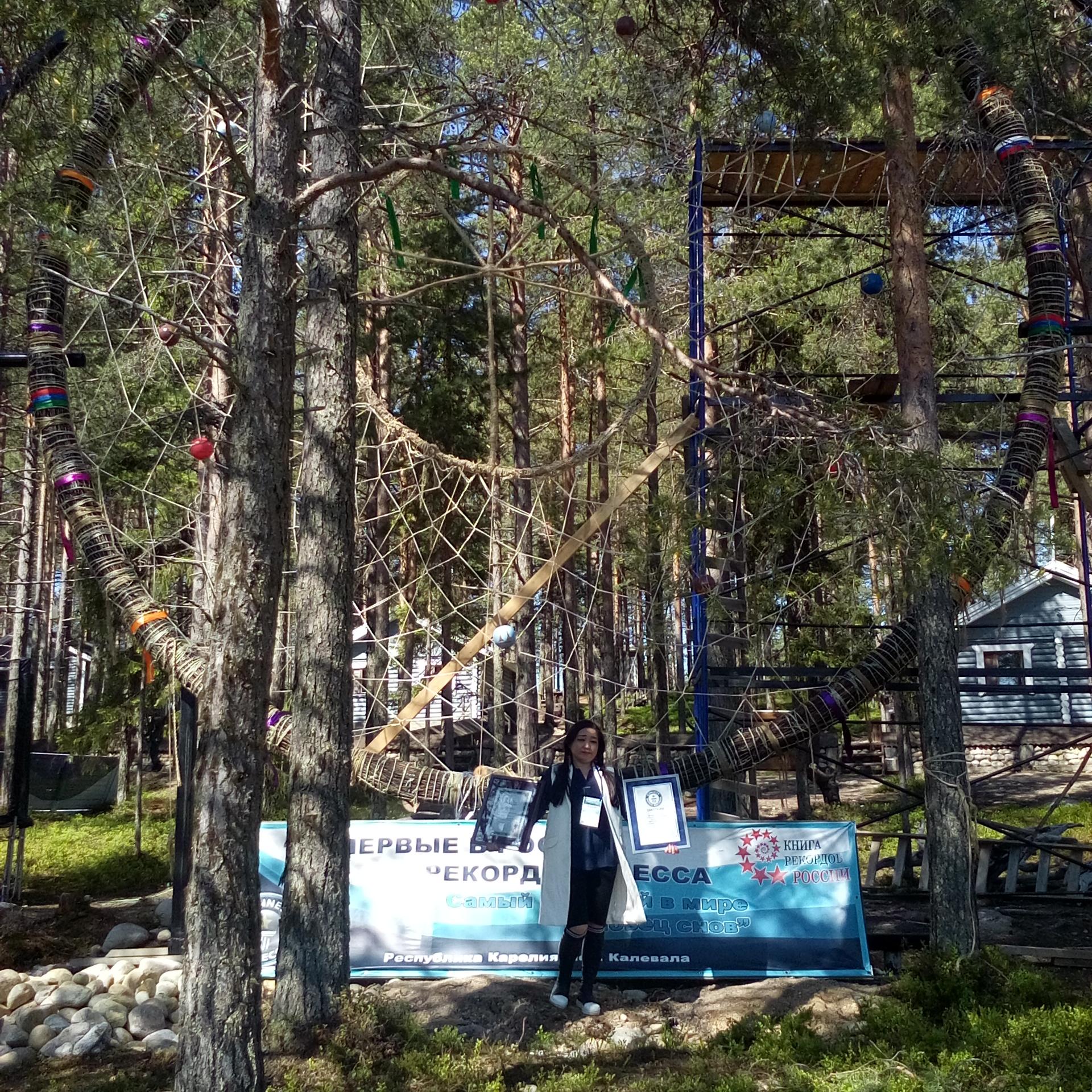 Самый большой Ловец Снов и его создатель.